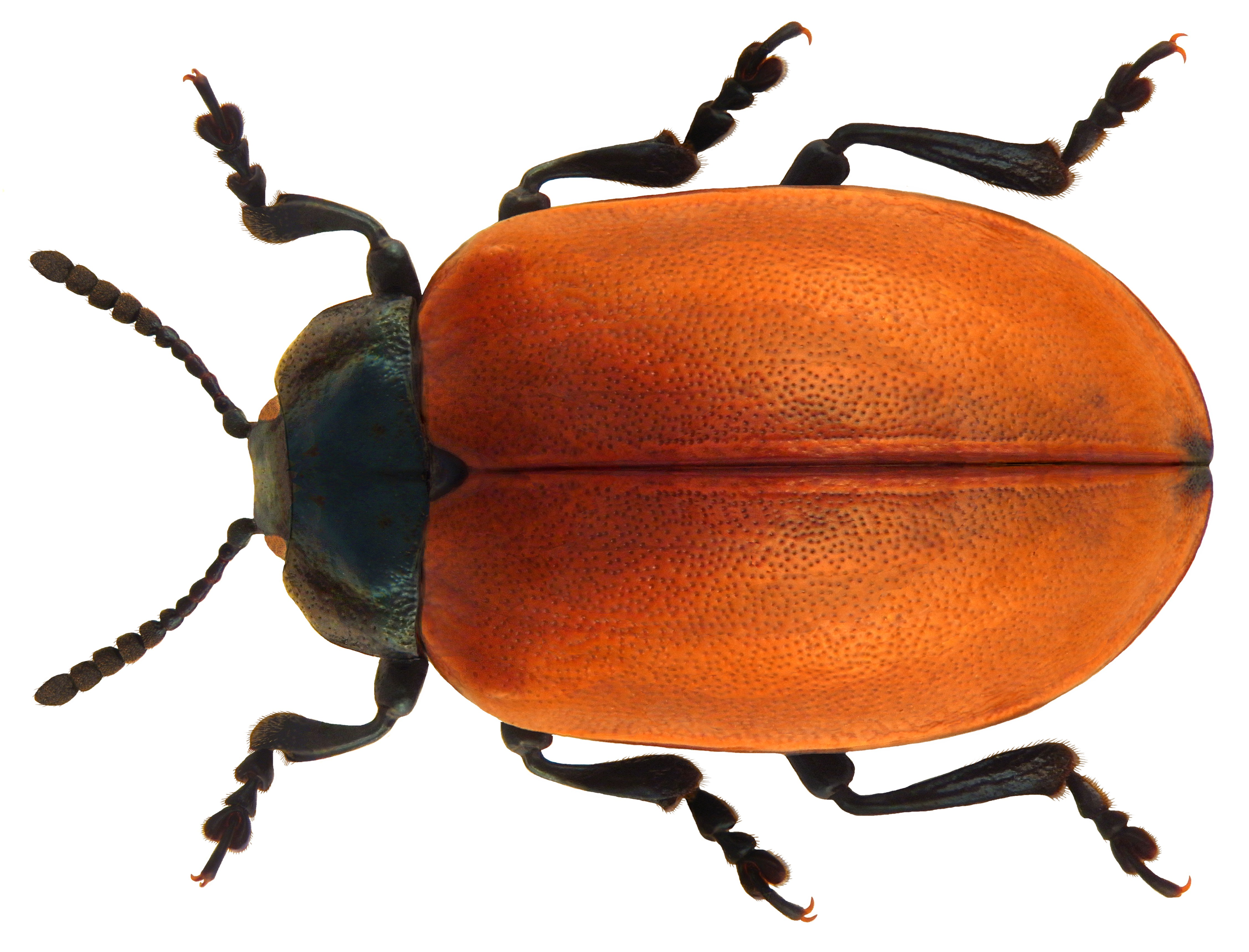 Chrysomela populi (Linné, 1767) Familie: Chrysomelidae Groesse: 10-12 mm Verbreitung: Europa Oekologie; auf Salix- und Populus-Artem Fundort: Korsika, Asco leg.det. U.Schmidt, 1973 Foto: U.Schmidt, 2010